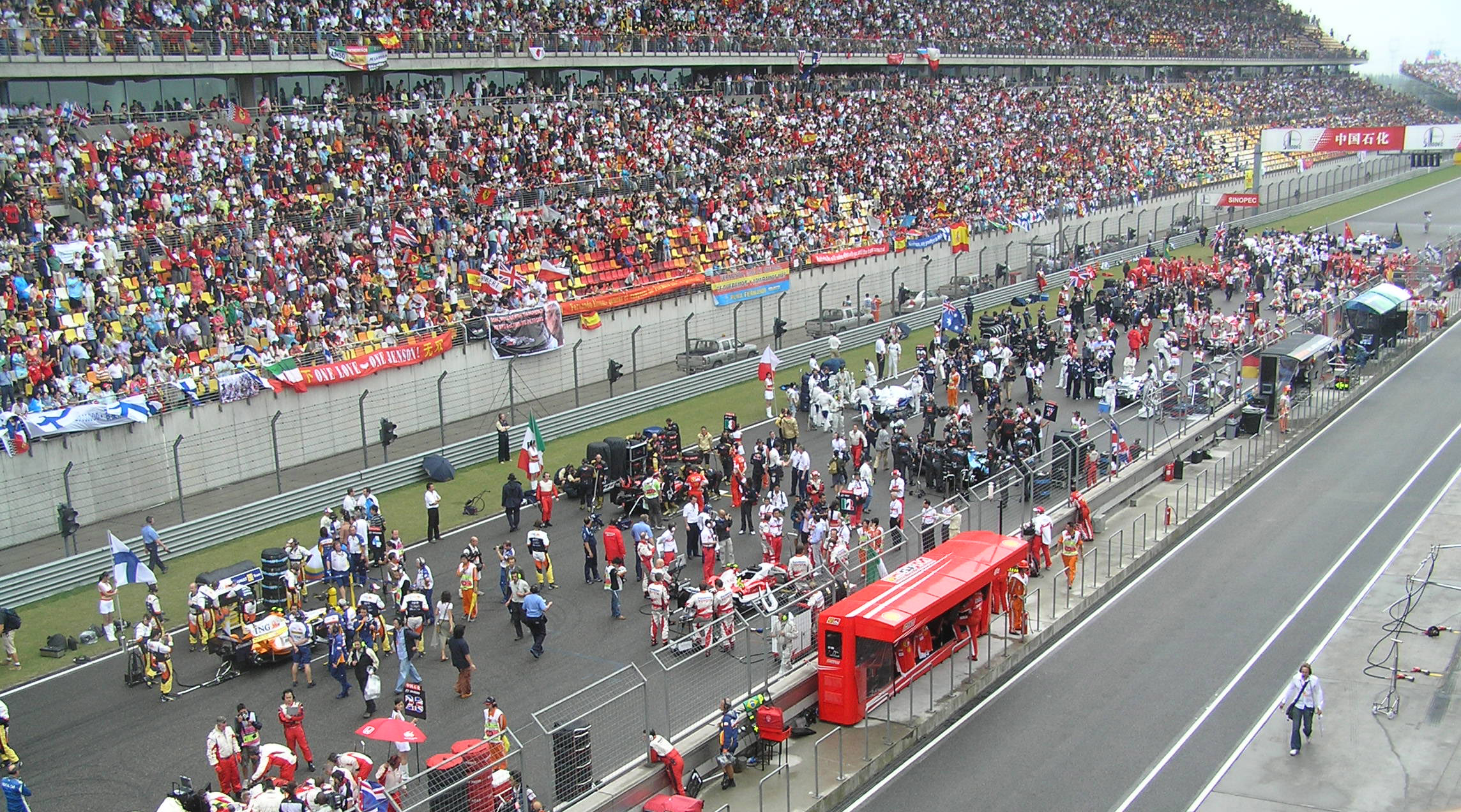 5 минут до старта Гран-при Китая 2007 года